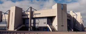 Stade Michel-d'Ornano